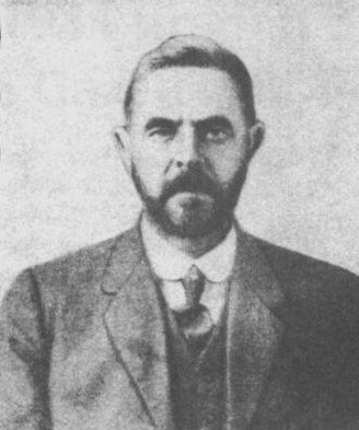 Foto van Walthère Dewé, (Walthère Joseph Charles DEWE)